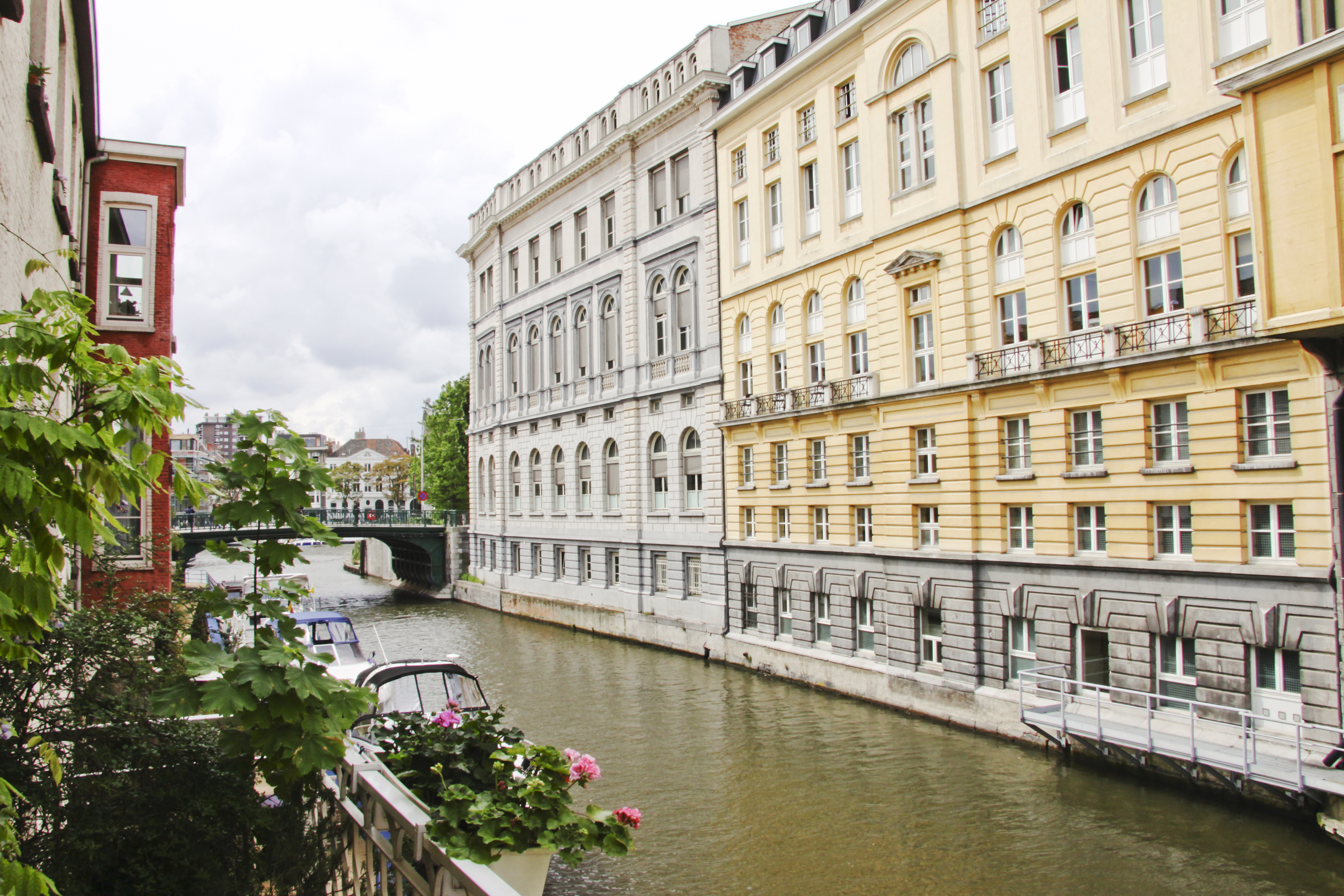 Ketelvest